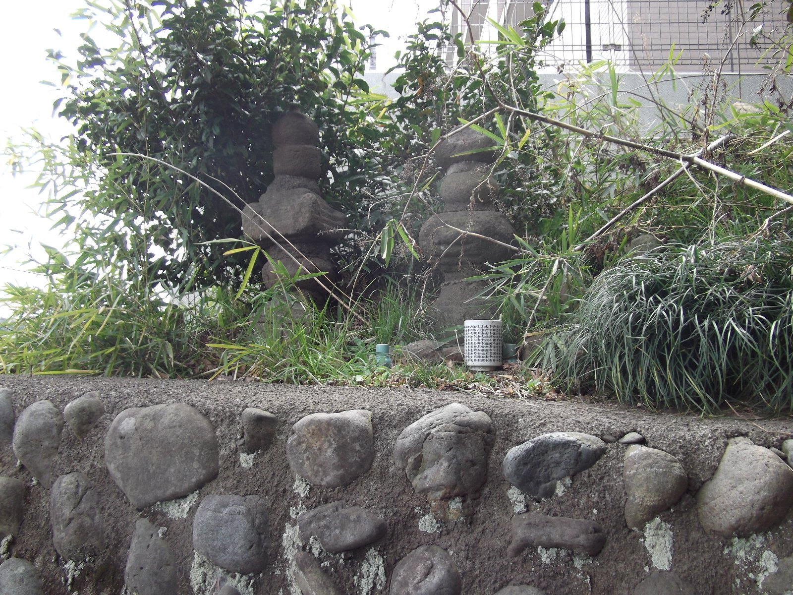 関戸合戦で戦死した無名戦士の墓と伝えられる石塔。東京都多摩市。